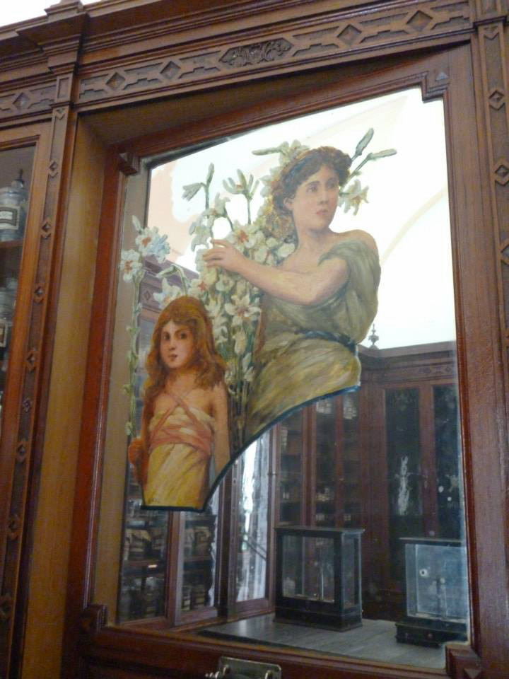 Il dipinto di Giovanni Gentile all’interno dell’Antica Farmacia Cartia